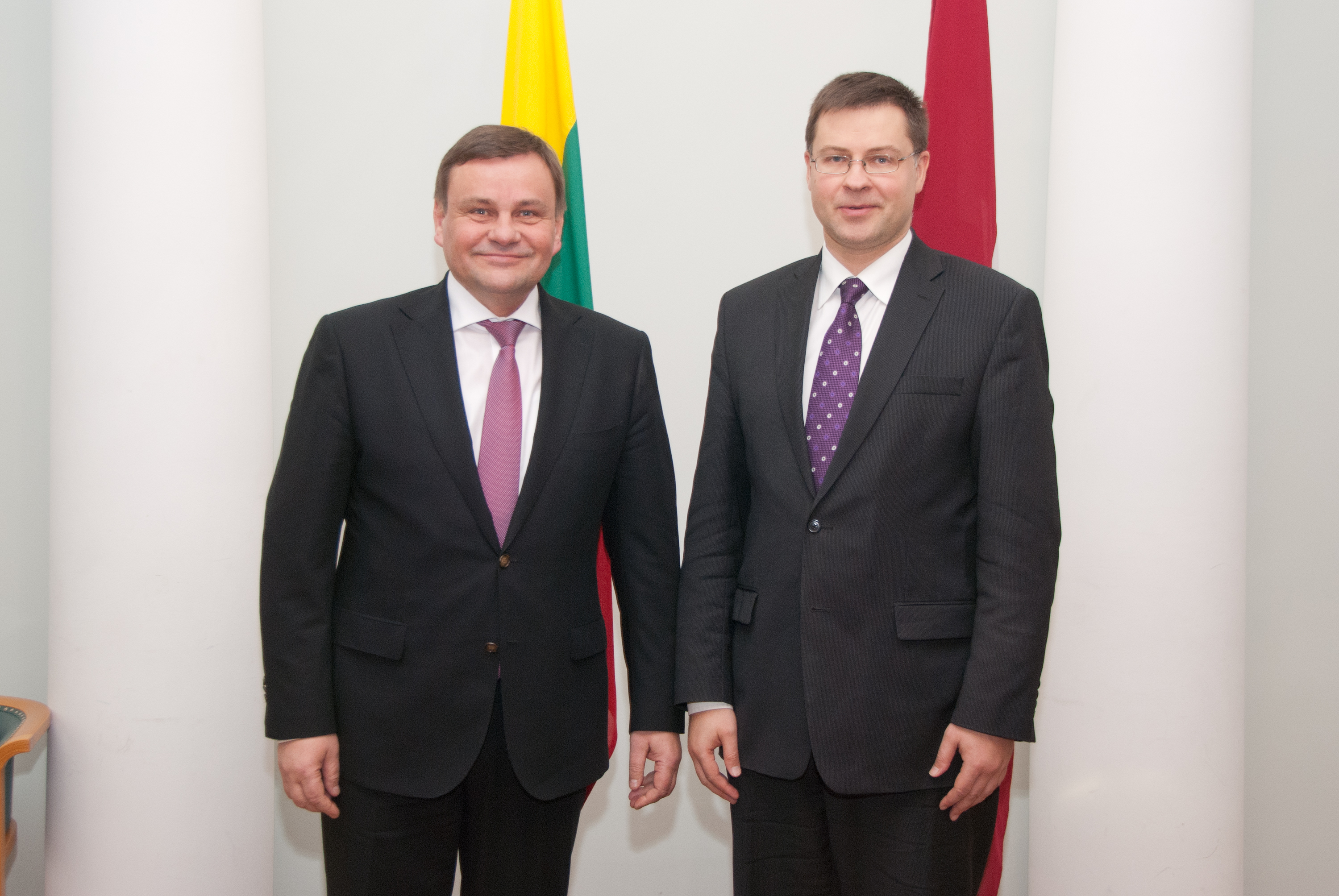 Foto: Toms Norde, Valsts kanceleja